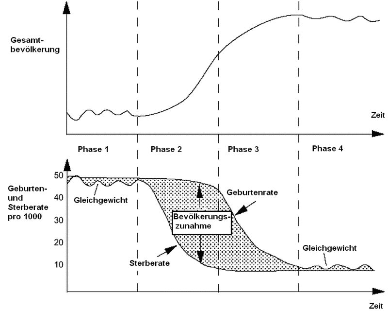 Grafik: Modell des Demograhischen Uebergangs. (urspruengl. 4 phasiges Modell) Eigene Grafik, erstellt am 15.03.2004. Farbtiefe: 16 (4 BitsPerPixel) Bildgroesse: 800 x 640 Pixels (B x H) Beschriftungen: deutsch Dateiformat: PNG Dateigroesse: 24.81 KB (25404 Bytes)